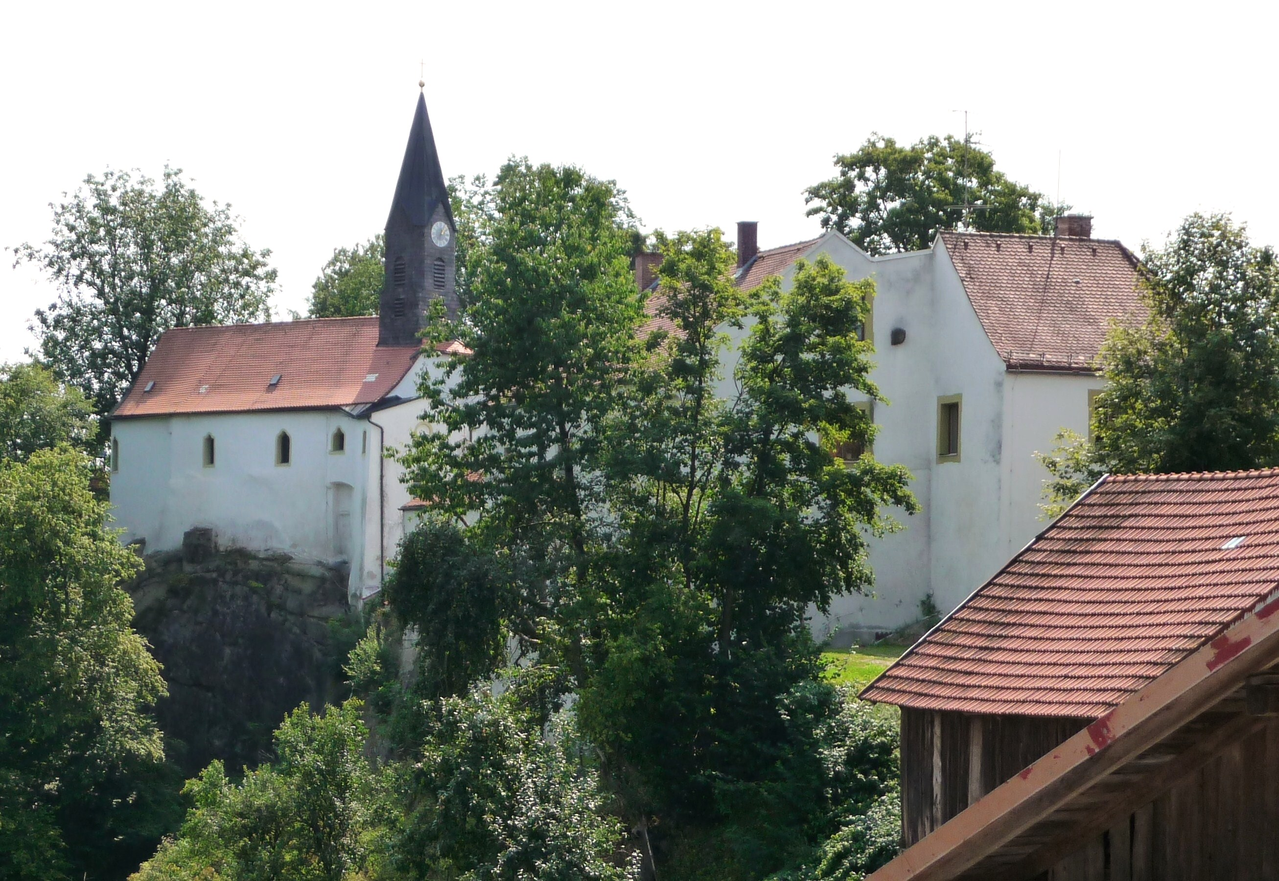 Kirche und Schloss Ranfels